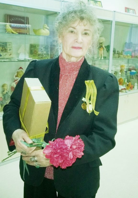 Надежда Мурыгина, житель блокадного Ленинграда в Музее ленинградского детства